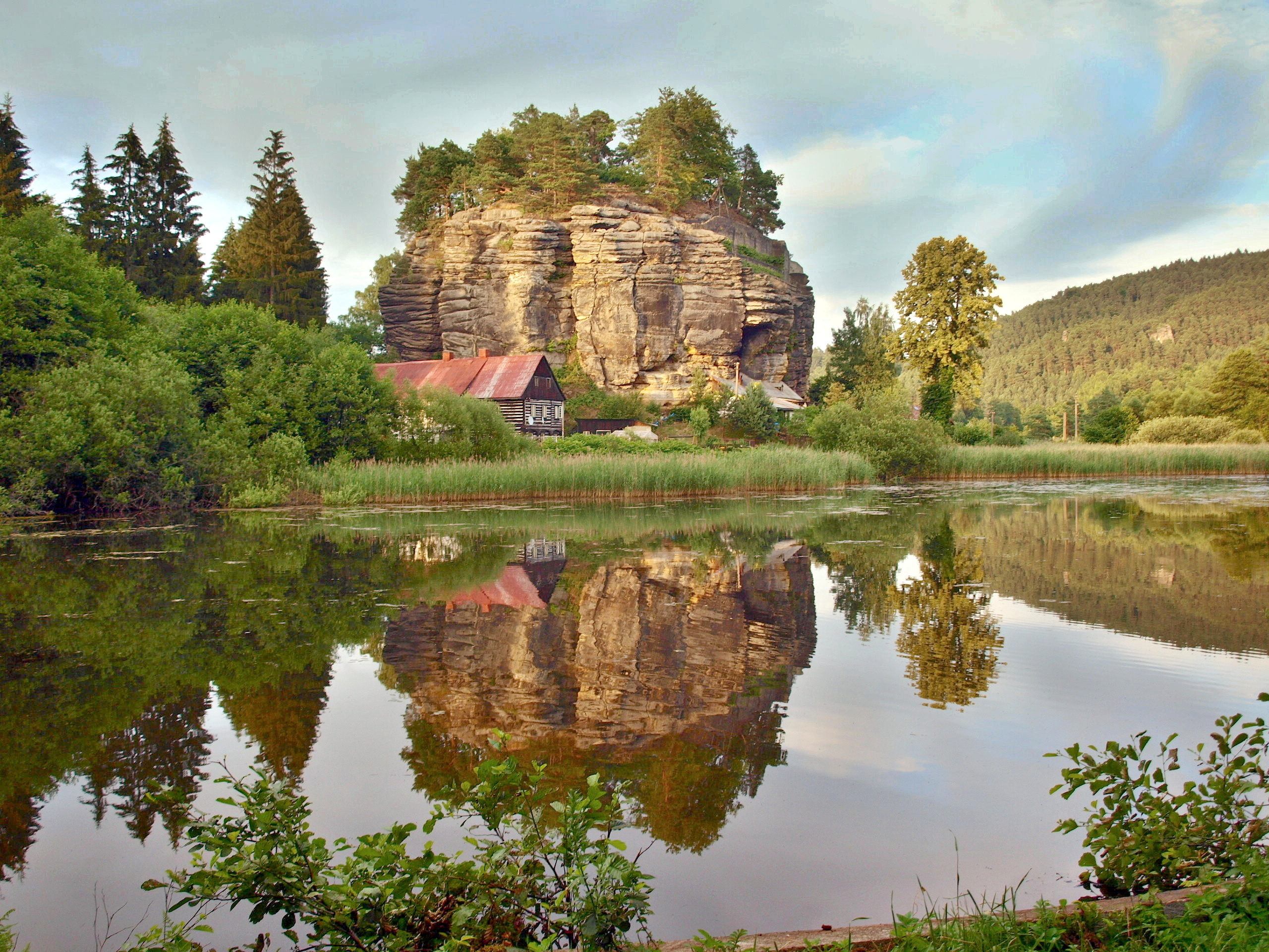 Sloup, skalní hrad